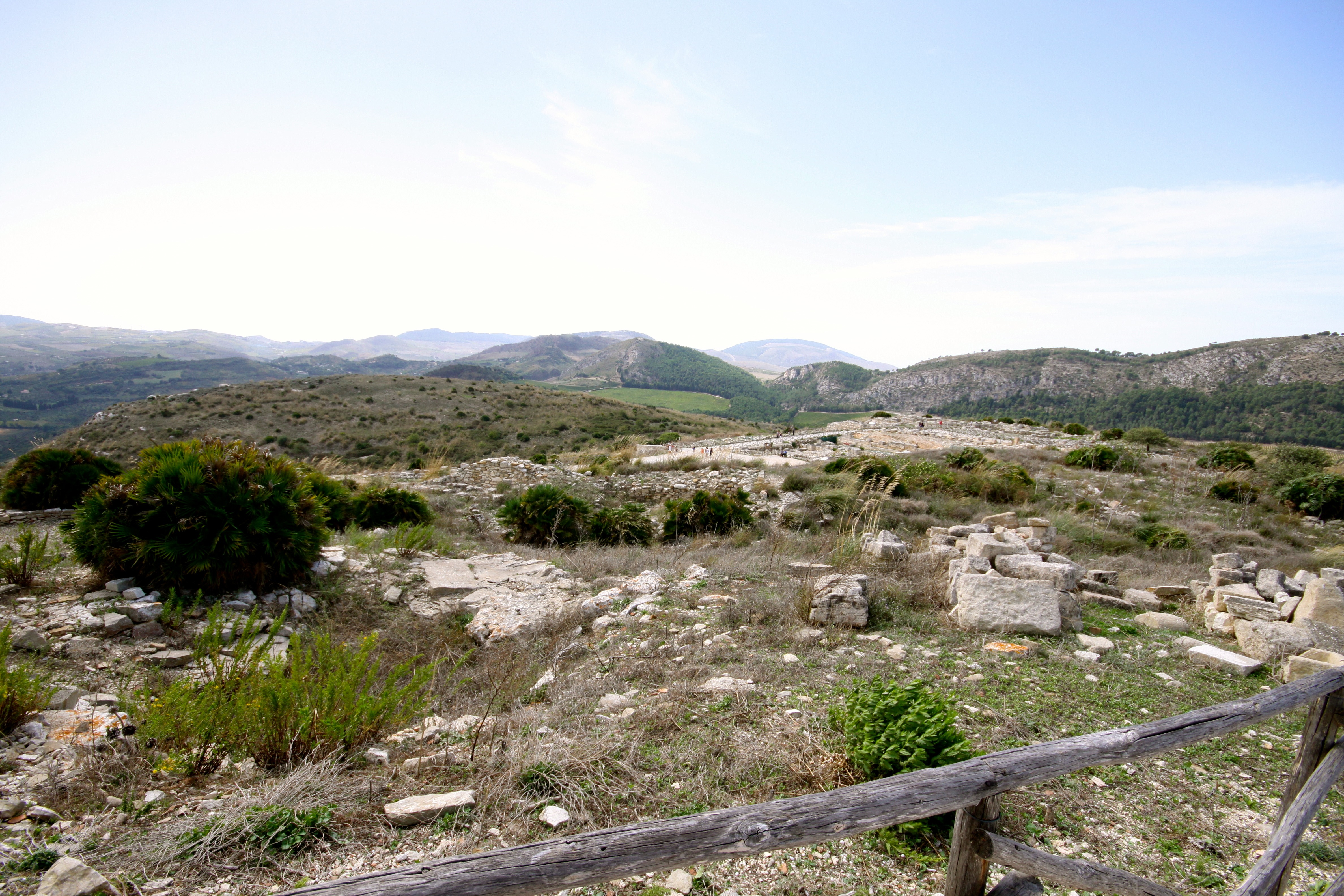 Segesta Ruine einer Moschee auf der Akropolis